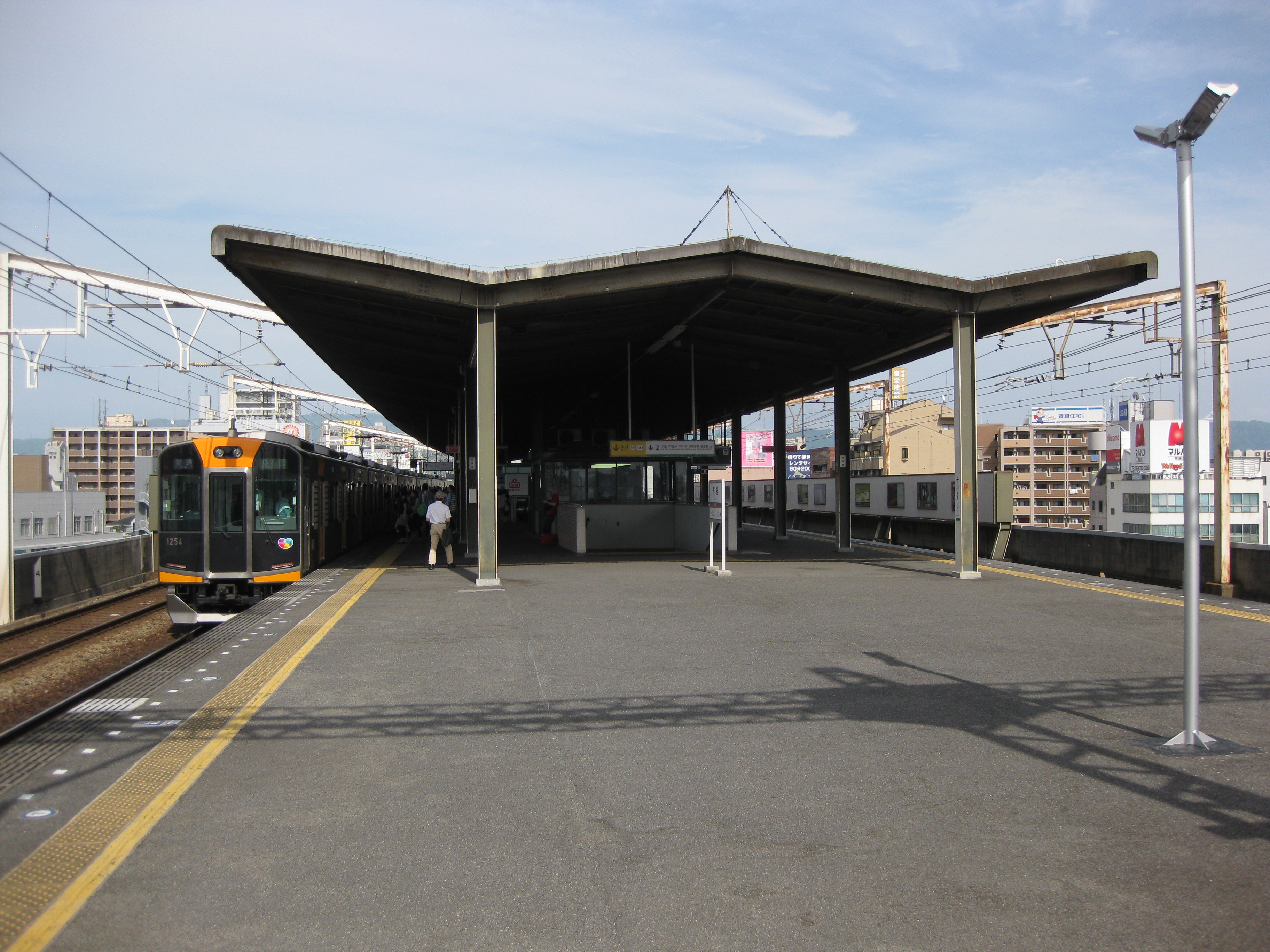 布施駅奈良線用プラットホーム